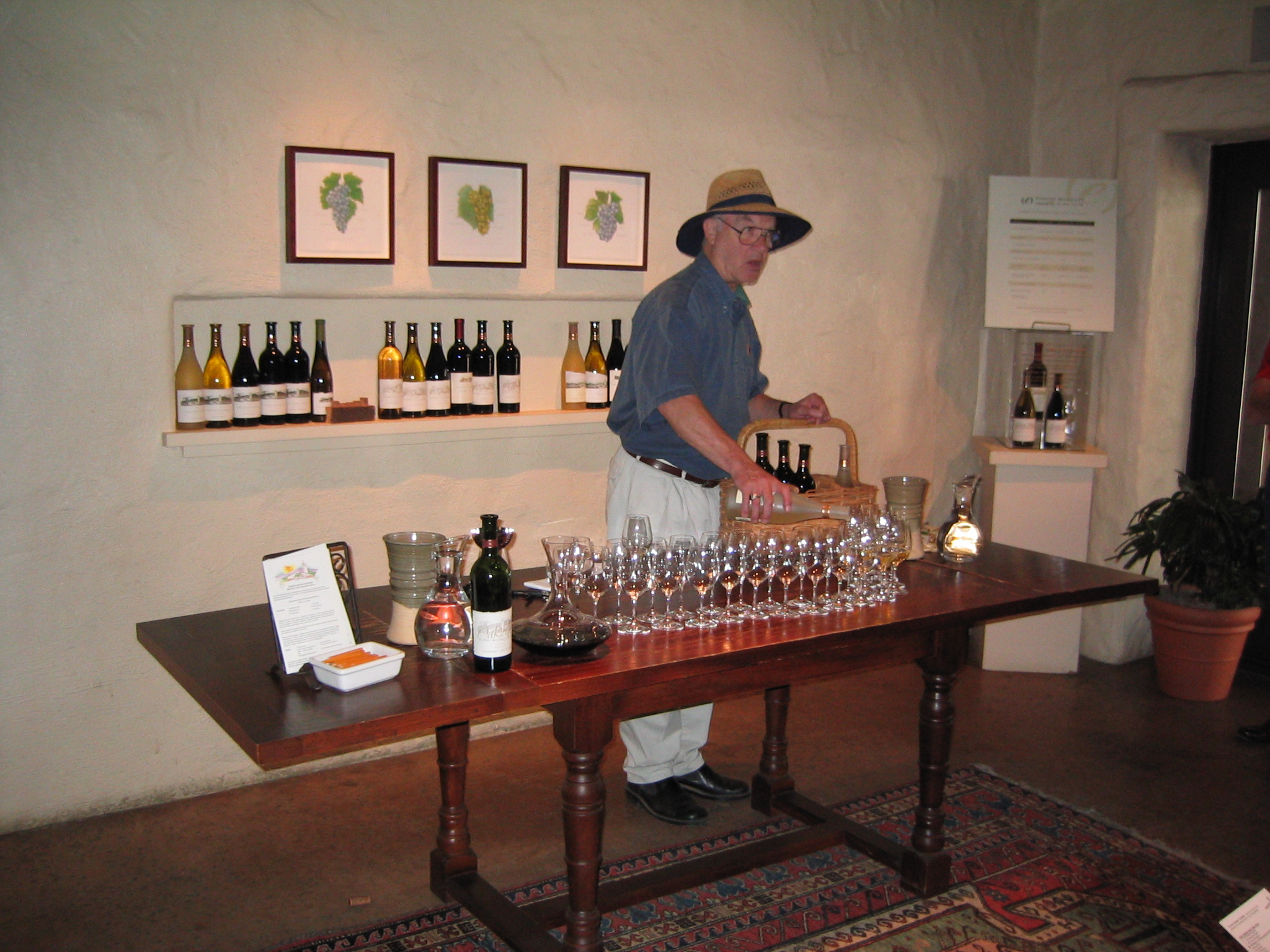 Robert Mondavi préparant une dégustation de ses vins en 2003